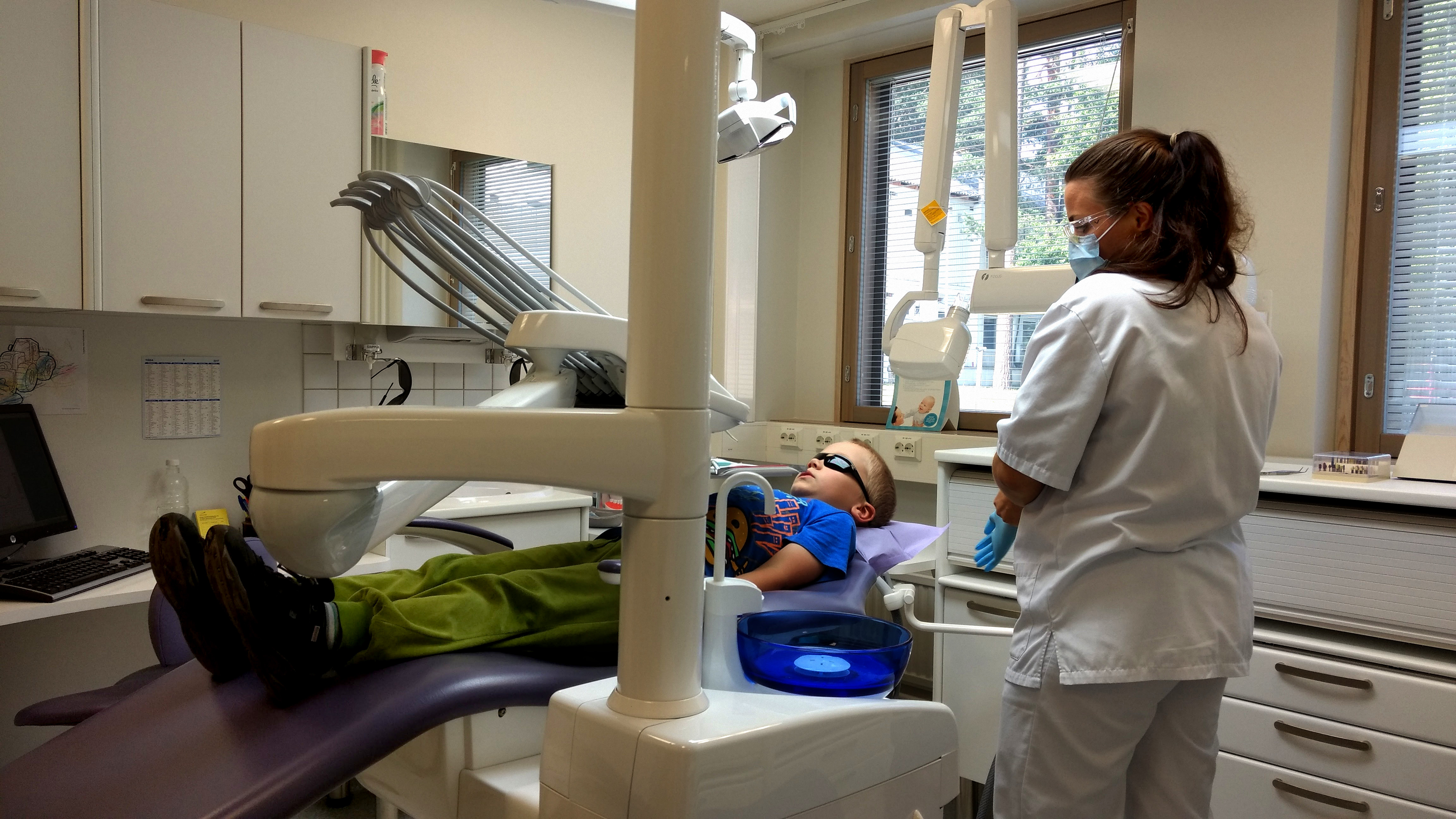 Julkinen hammashoito on ilmaista alle 18-vuotiaille lapsille.